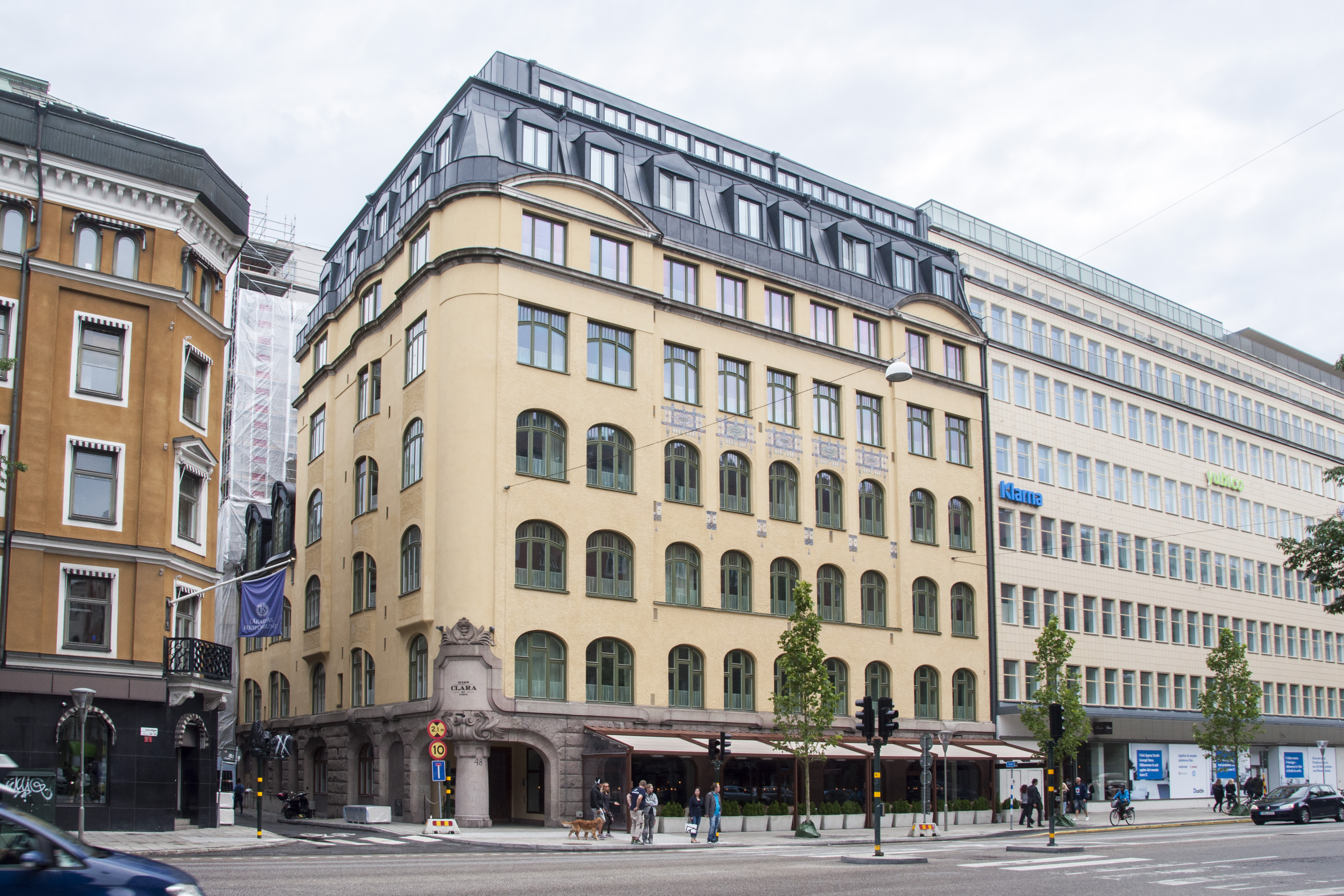 Miss Clara by Nobis, Sveavägen 48. Ursprungligen flickskolan Byggnadsår 1910, arkitekter Hagström & Ekman